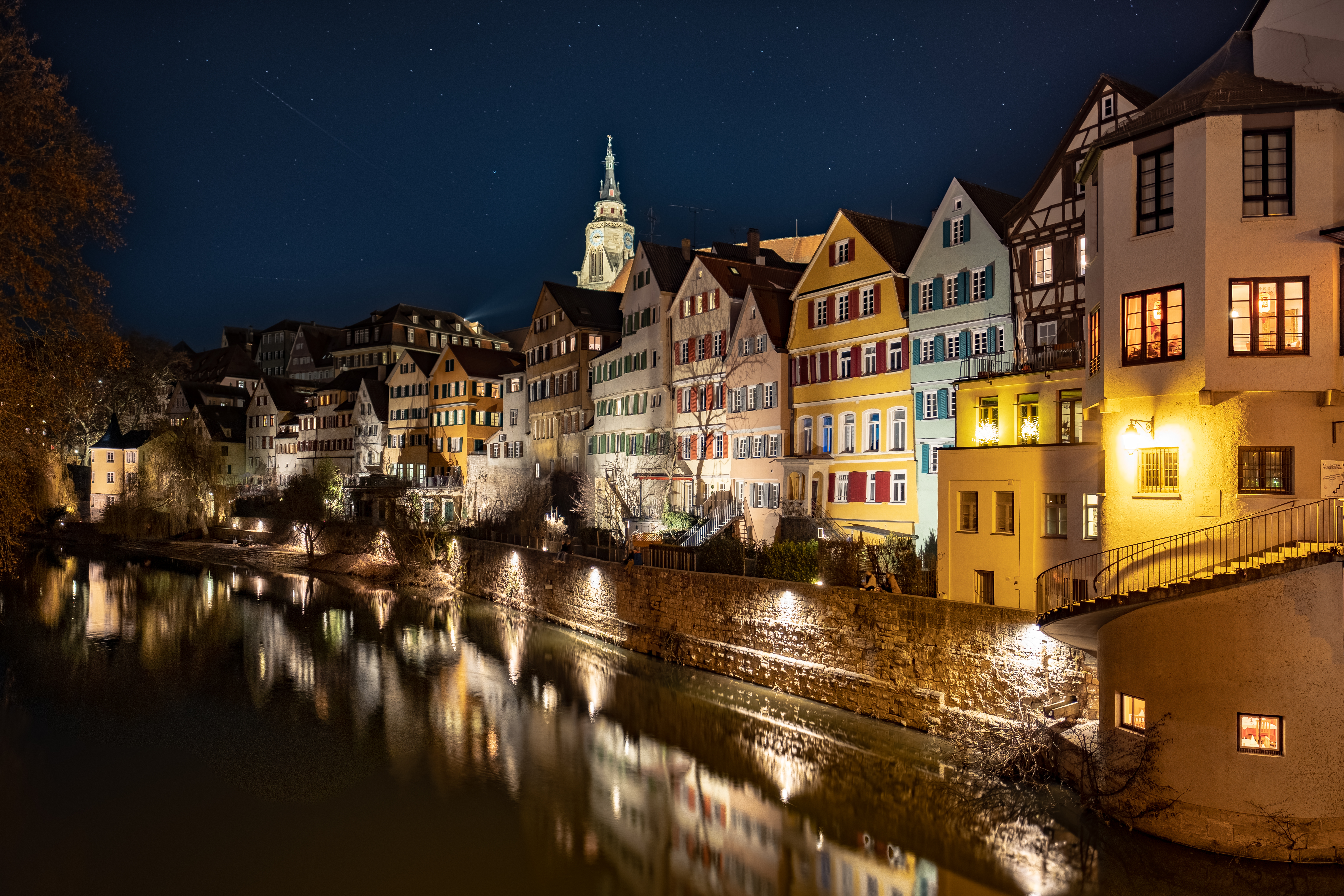 Neckarfront in Tübingen mit Sternenhimmel